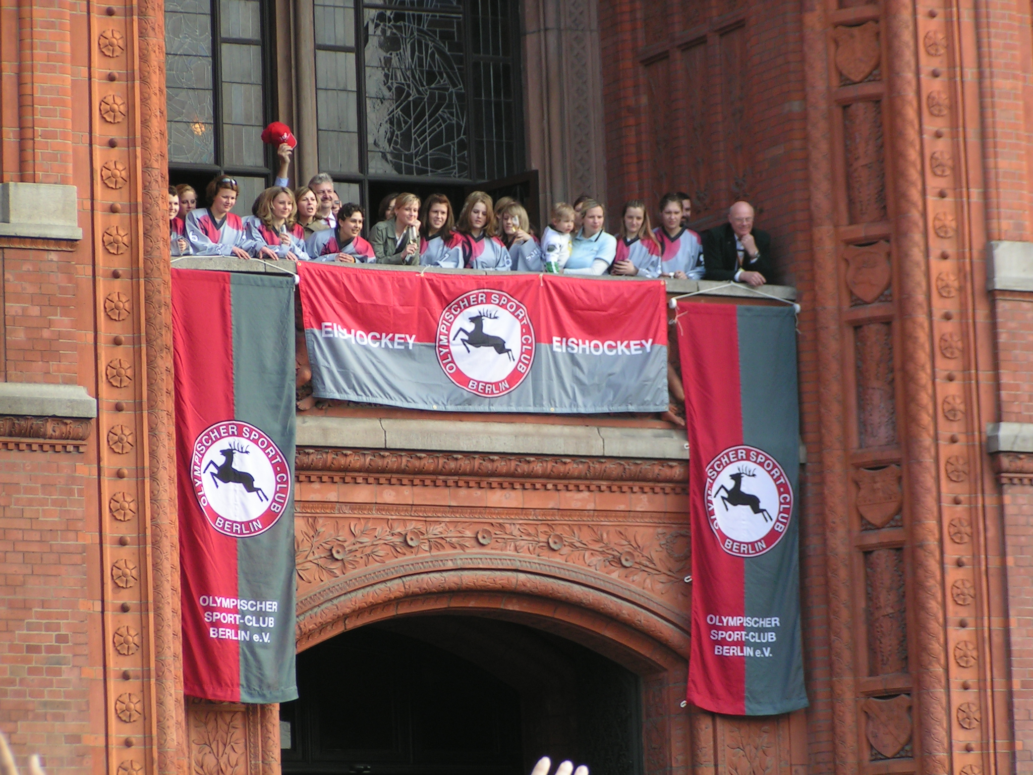 Empang des Deutschen Eishockeymeister der Frauen 2006 OSC Berlin im Berliner Rathaus